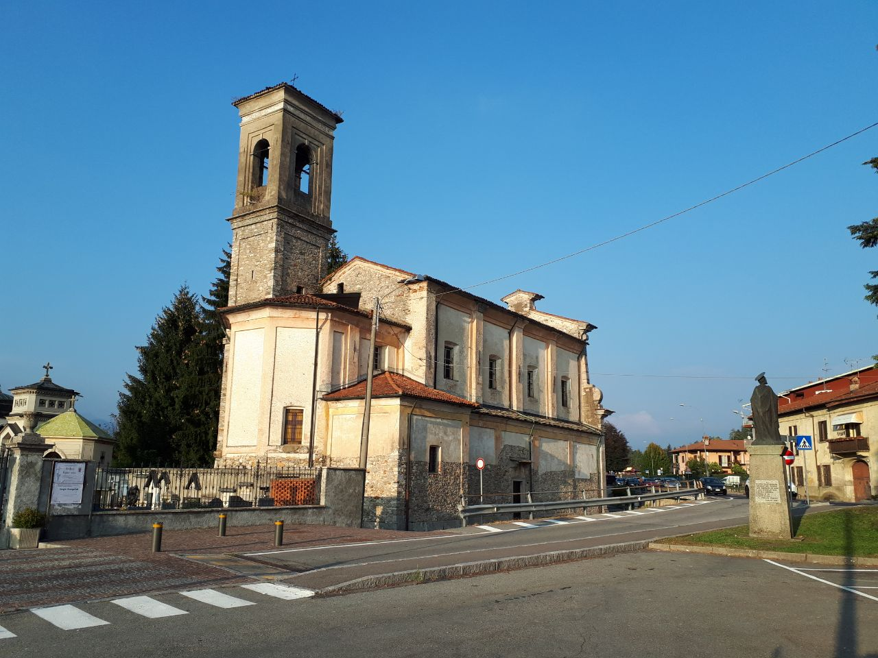 La chiesa di San Pietro a Marchirolo.